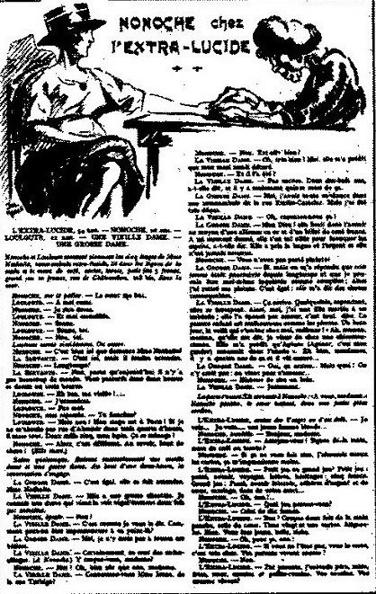 Page du Magazine Fantasio du 1er août 1921 publiant la saynète d'Irène Némirovsky intitulée Nonoche chez l'extralucide.